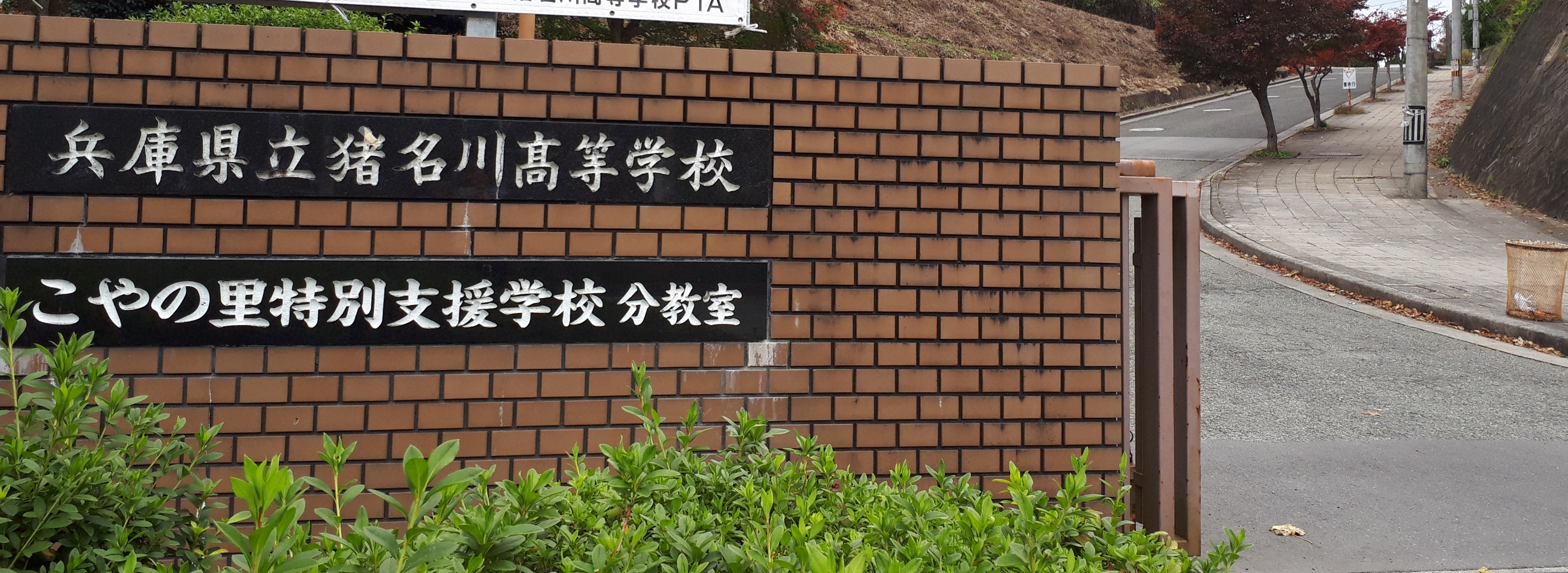 校門の外から撮影